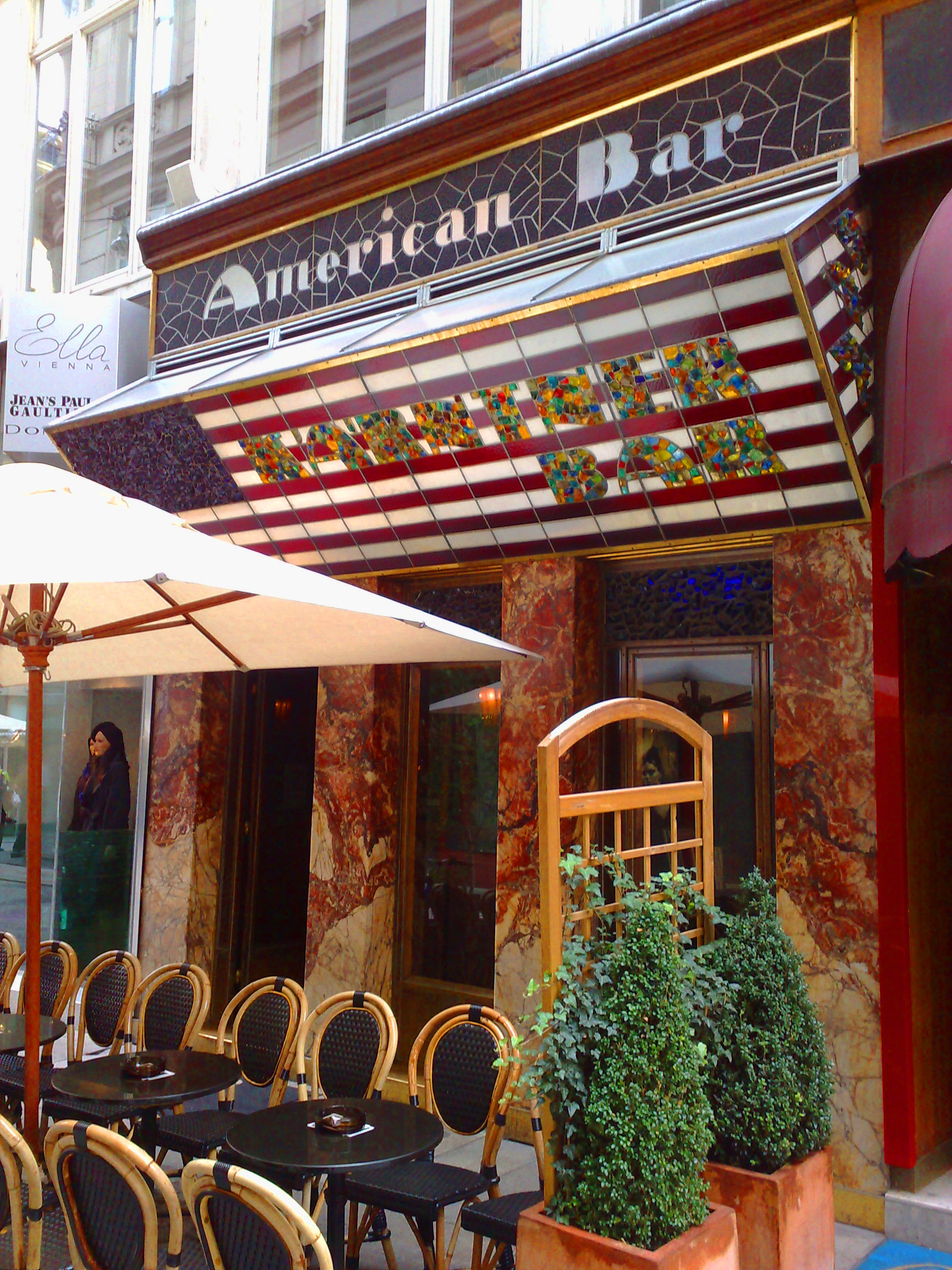 American bar